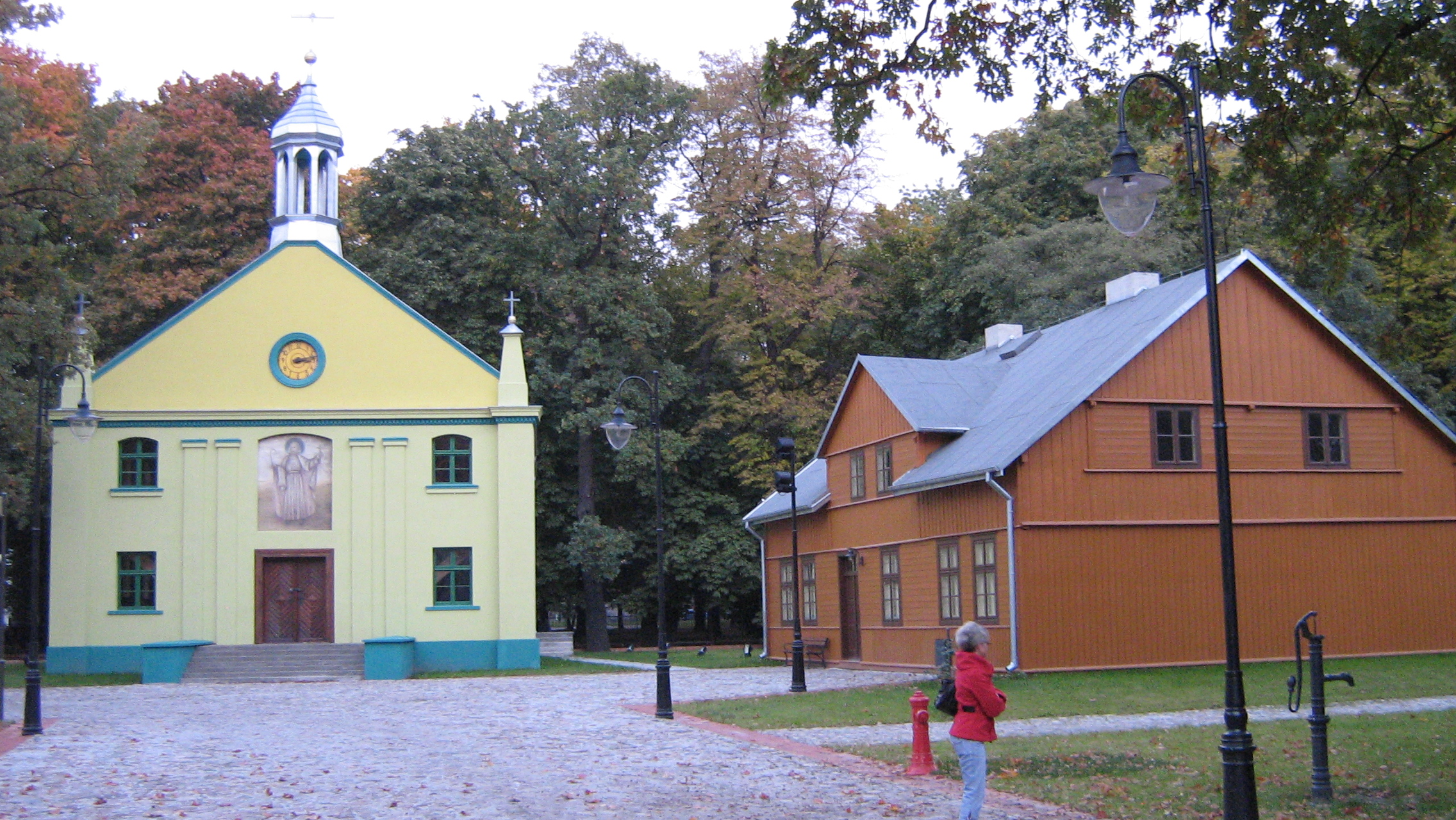 Skansen łódzkiej architektury drewnianej